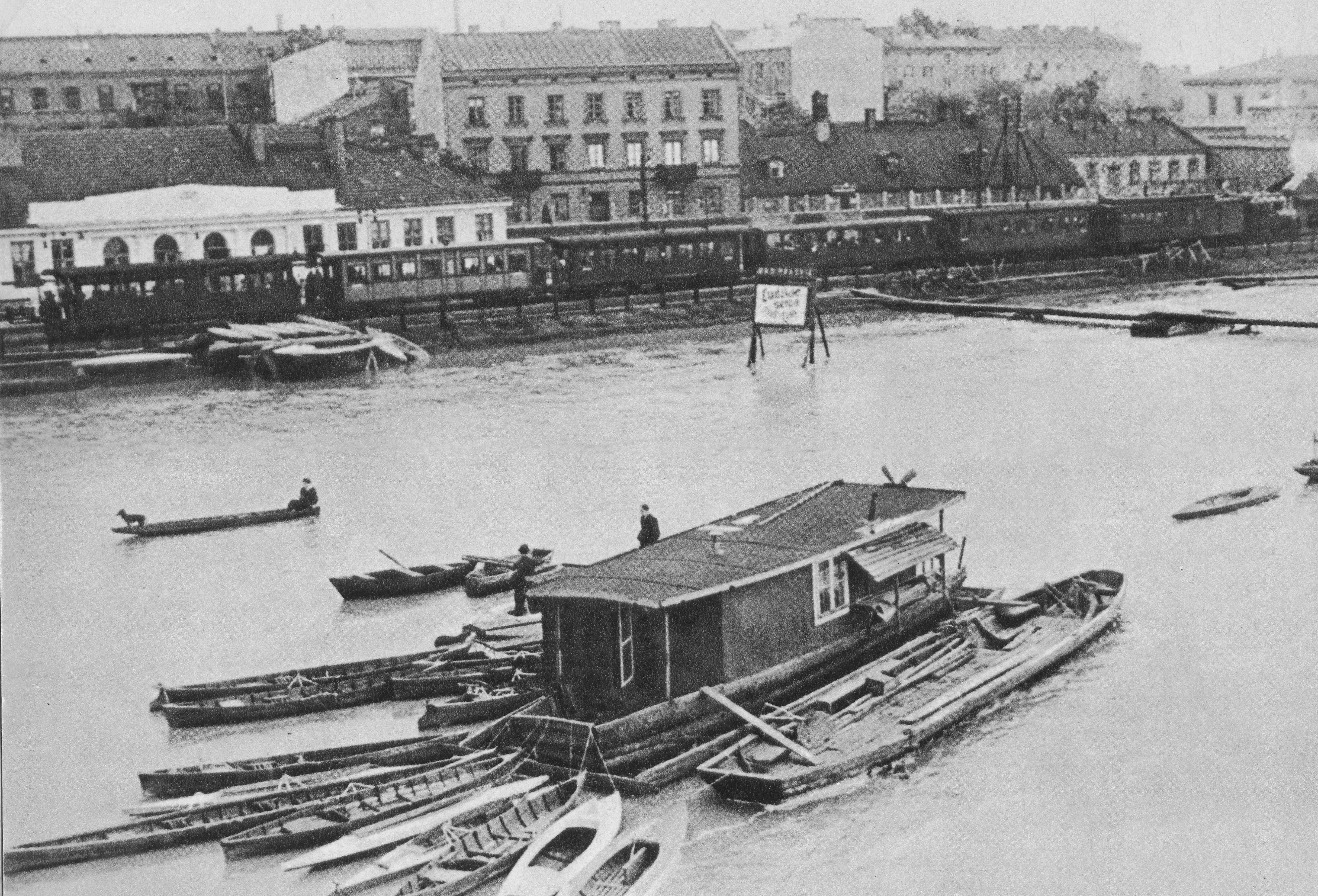 Wisła w Warszawie na wysokości stacji Most